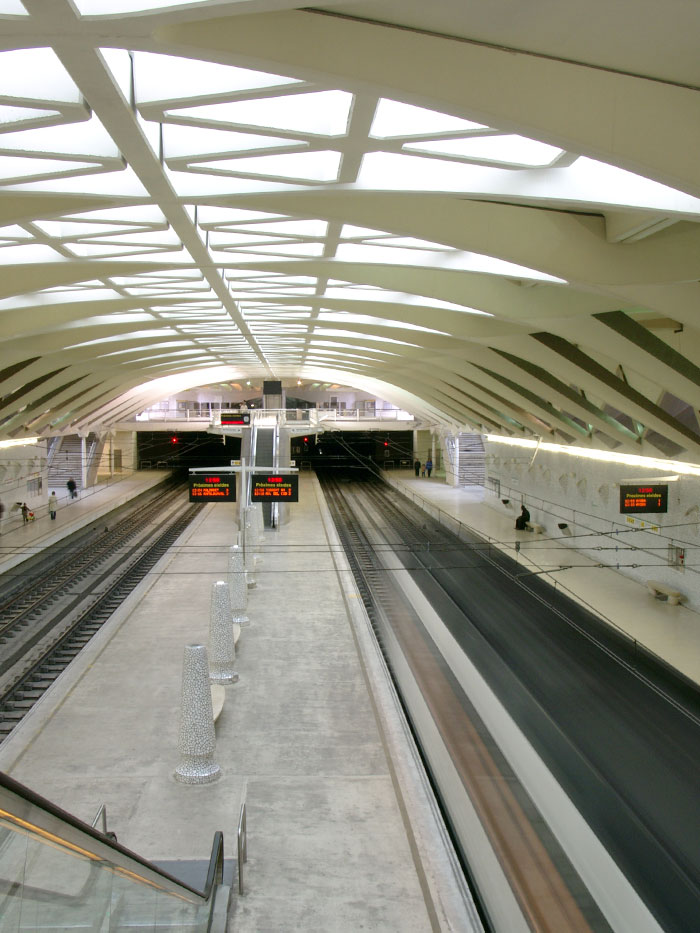 Description : Station de métro Alameda à Valence Espagne Source : German Wikipedia Photographe et déposant : Daniel Erler Date : 06 février 2005 Aus der deutschsprachigen Wikipedia: Benutzer:Reveal, 15:53, 4. Dez 2005